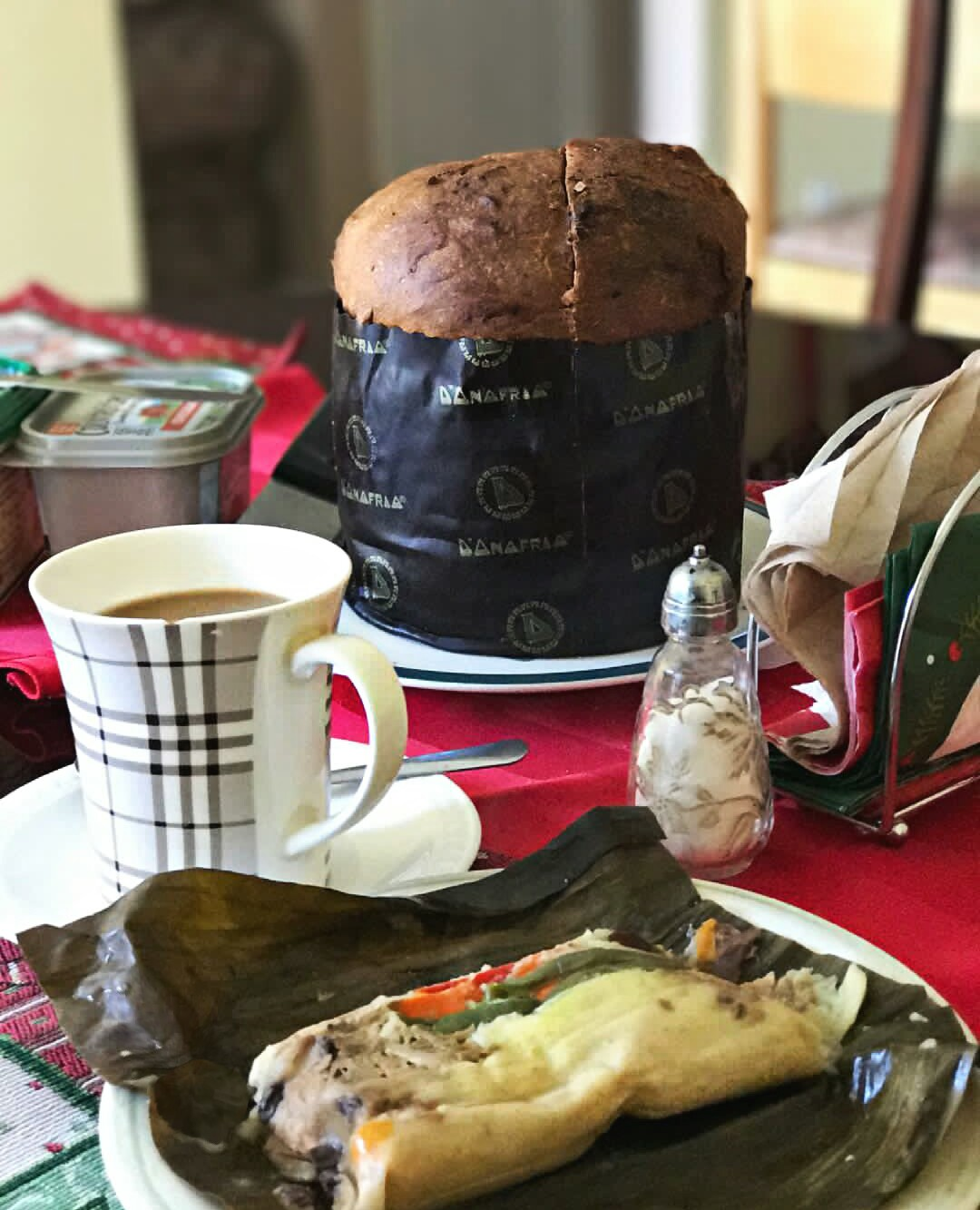 Desayuno costarricense navideño